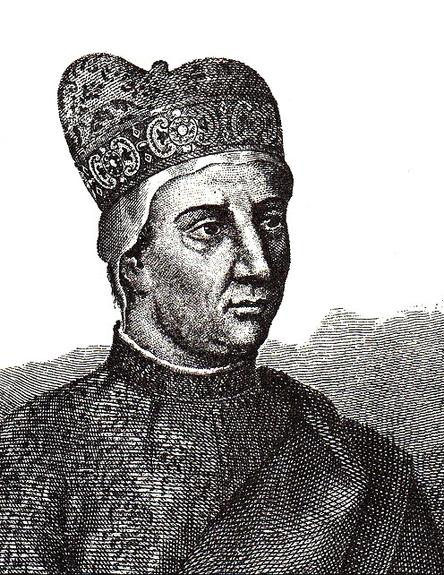 Дож Джованни Соранцо